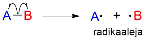 Radikaalin muodostuksessa sidos katkeaa homolyyttisesti ja kukin atomi ottaa yhden elektronin sidosta muodostavasta elektroniparista. Yhden elektronin siirtymistä kuvataan yksiväkäsisellä reaktiomekanisminuolella.